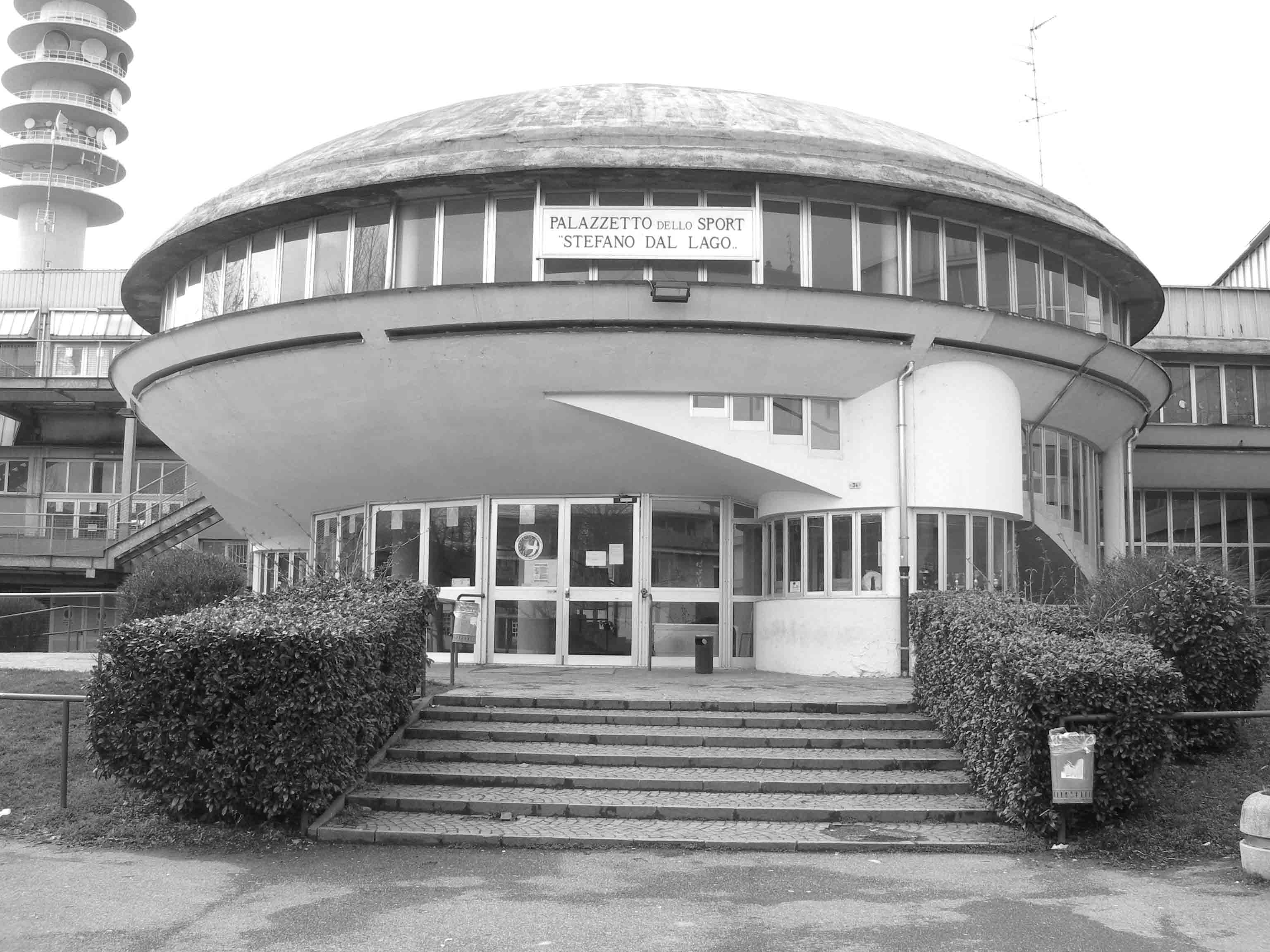 Palazzetto dello sport Stefano Dal Lago